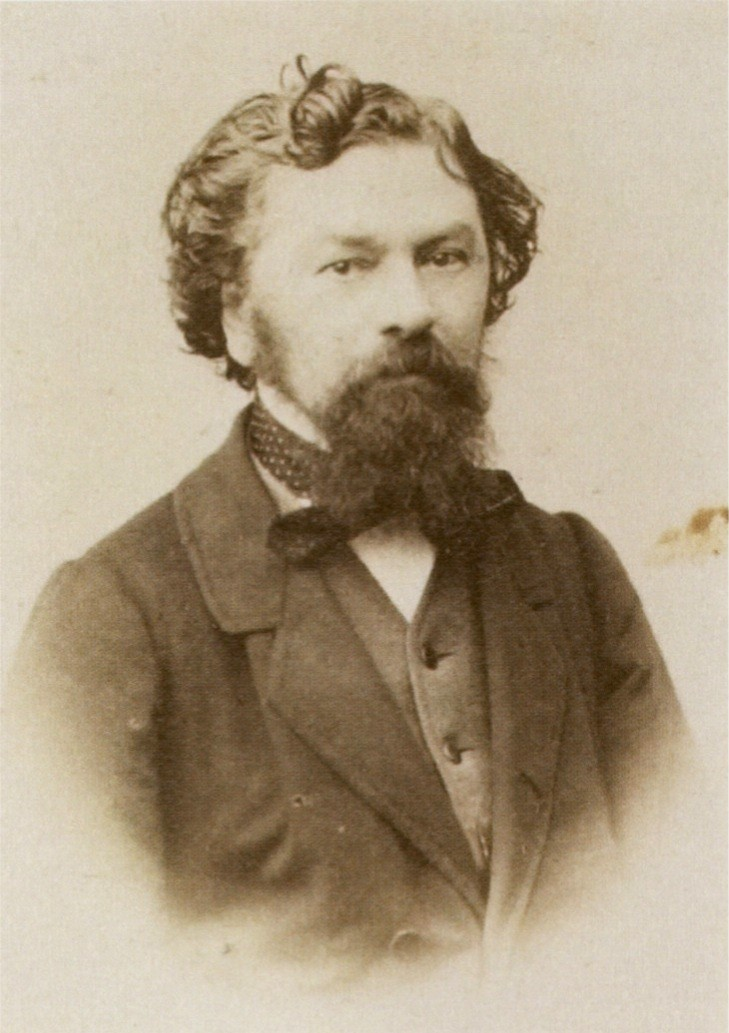 Porträt Ignaz Karl Figuly von Szeps